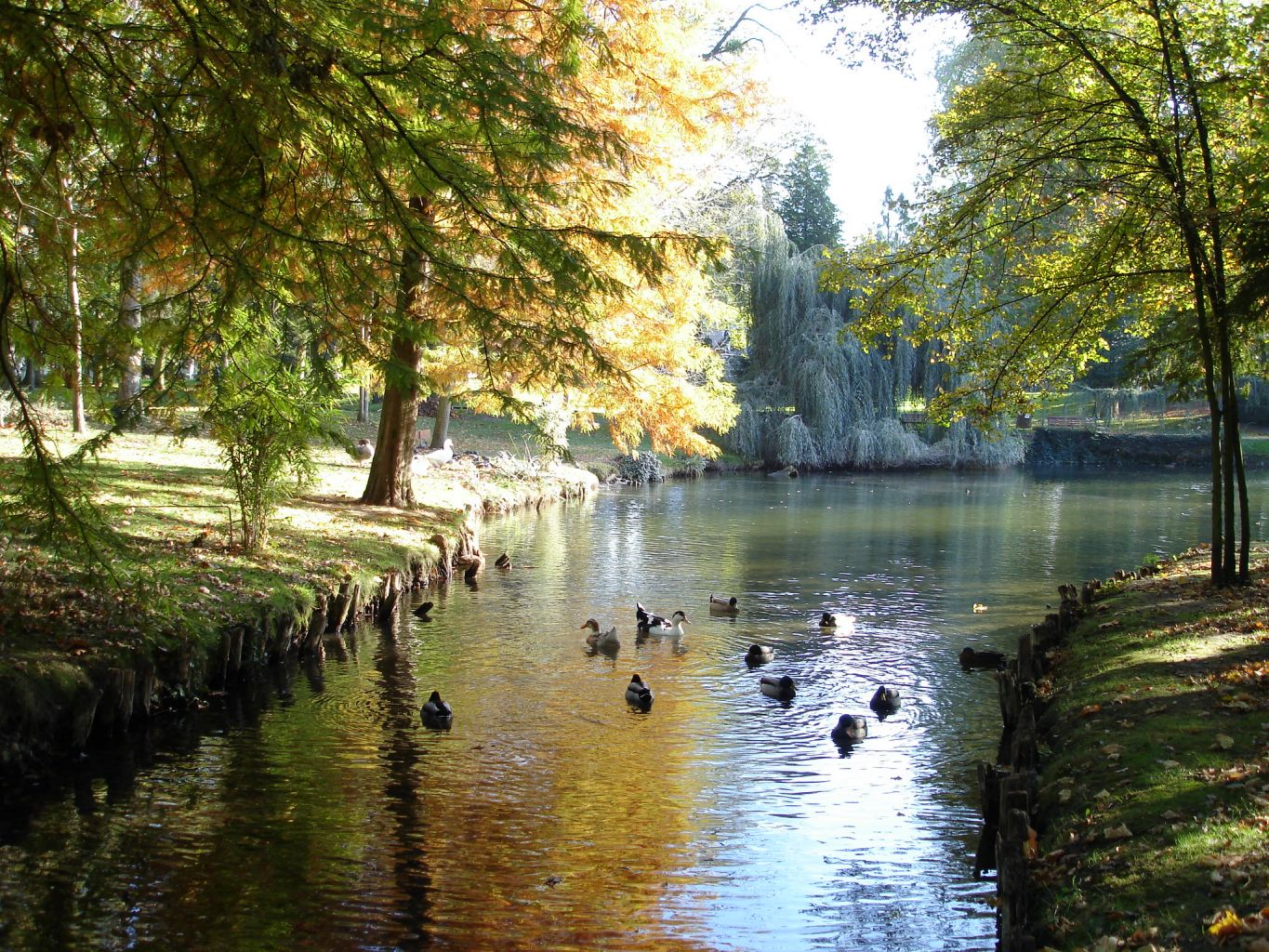 Parc Lefèvre à Livry-Gargan (France) - Novembre 2006 Photo personnelle de clicsouris